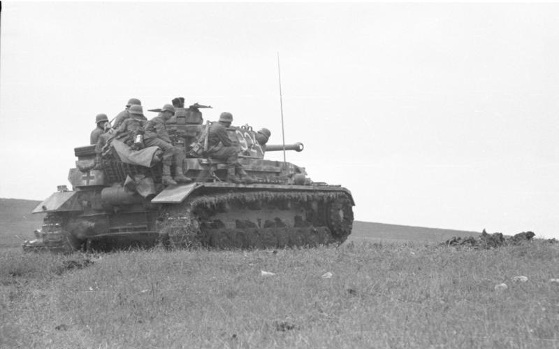 Krim, Mai 1942 Im Kampf um die Halbinsel Kertsch